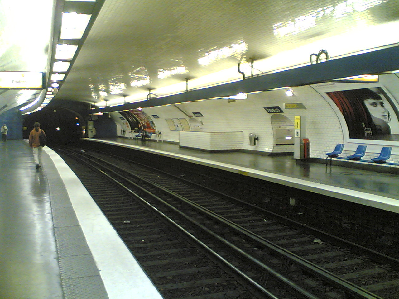 Quais de la station Jussieu ligne 10 du métro de Paris